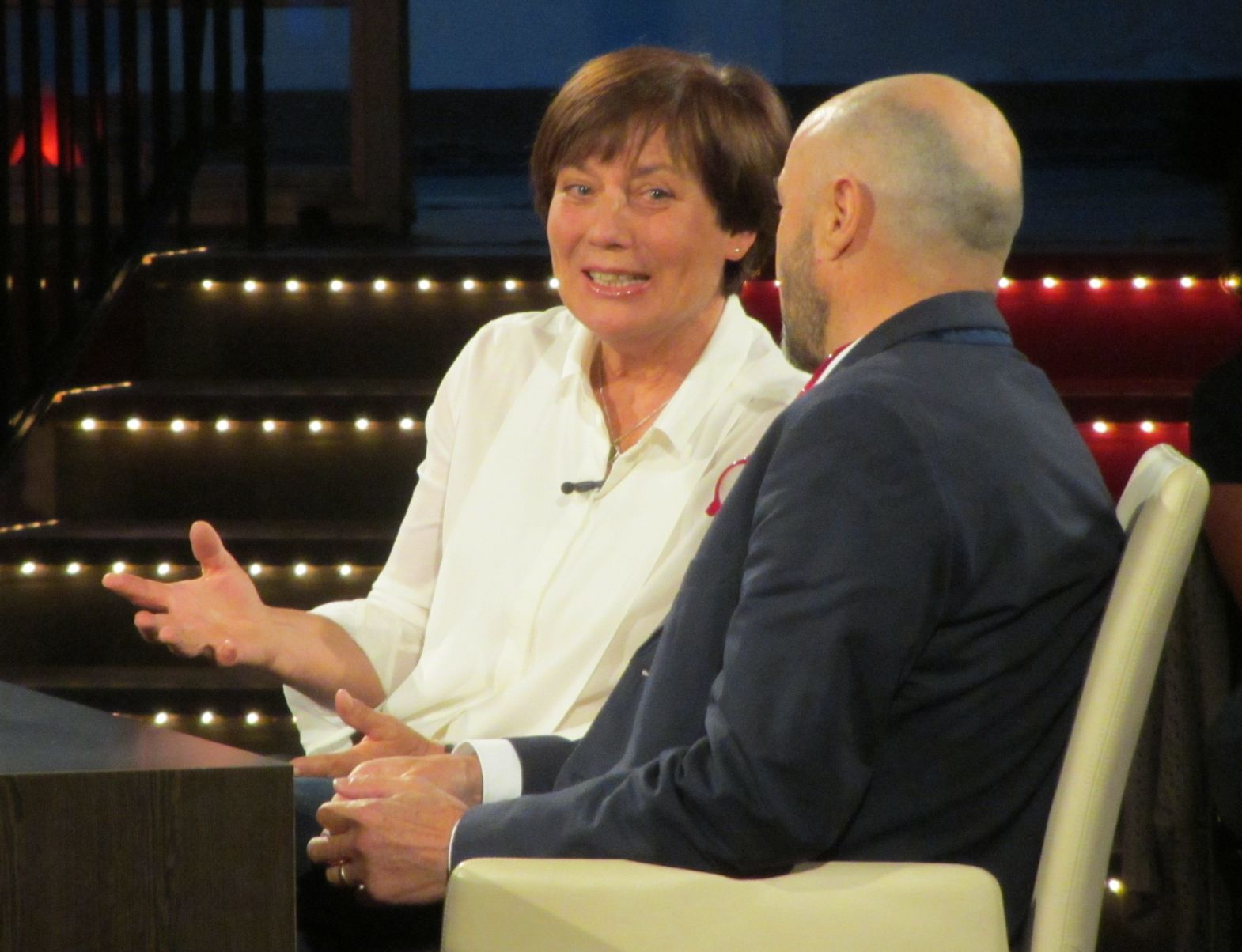 Rosi Mittermaier (li.) und Ehemann Christian Neureuther (re.) in der SWR-Fernsehsendung Menschen der Woche mit Moderator Frank Elstner